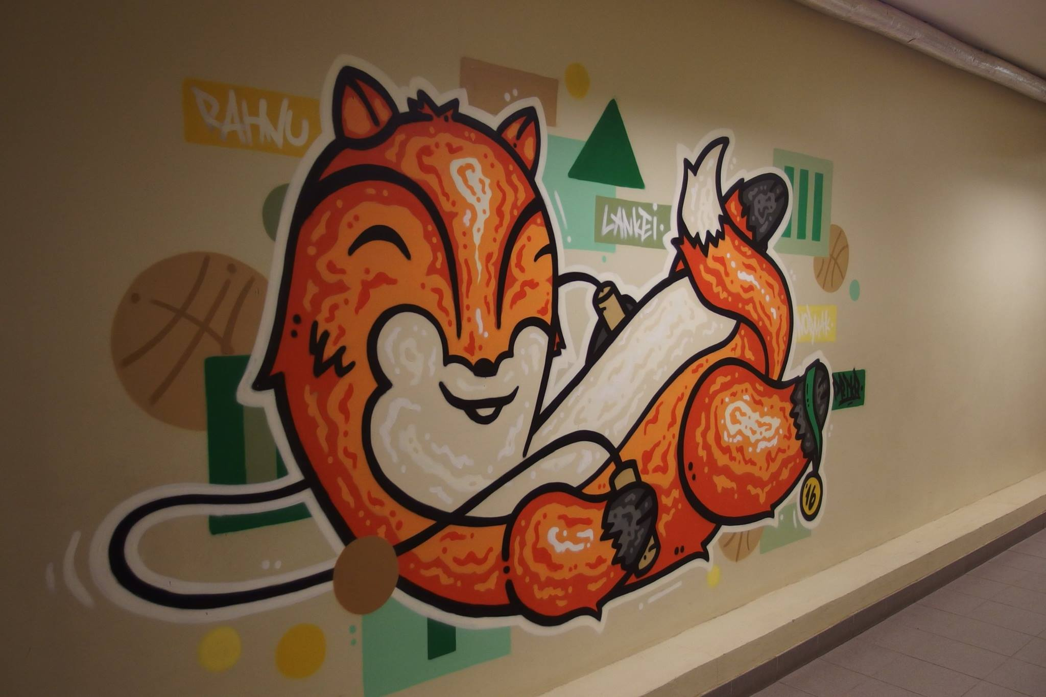 Grafiti Kadrina keskkoolis (grafiti ja foto autor PRTKR, aasta 2016)